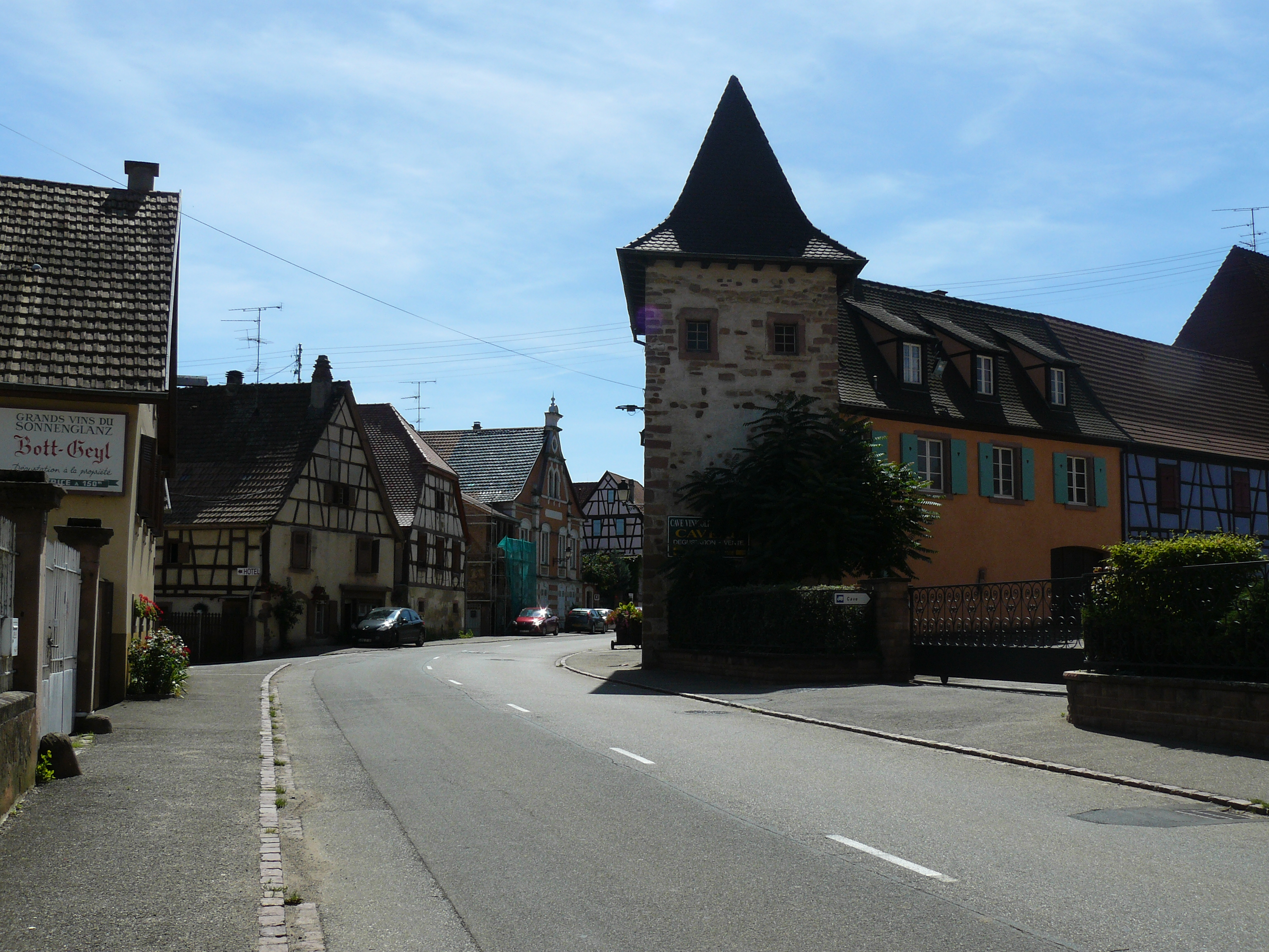 L'entrée du village de Beblenheim vers l'est